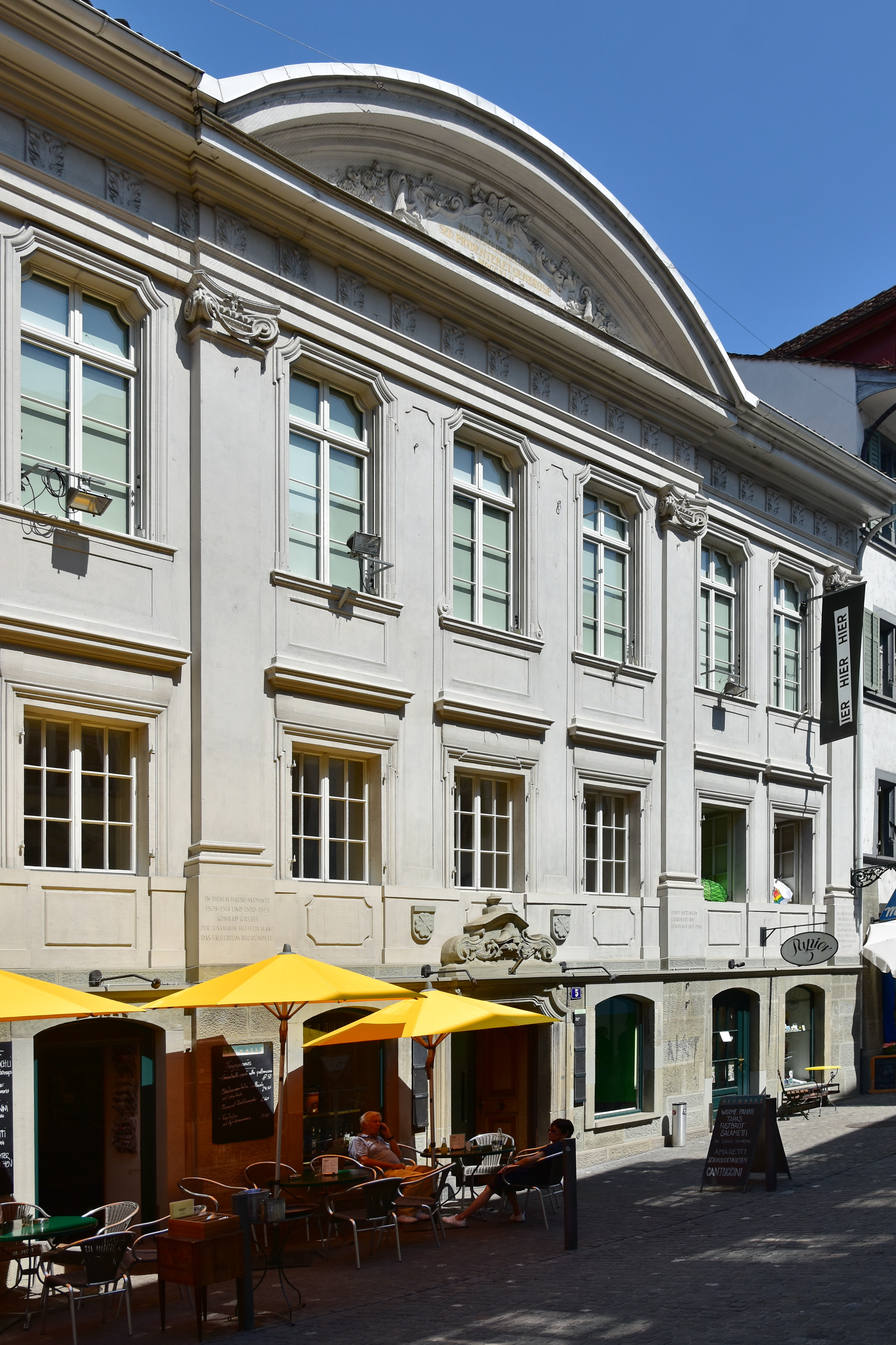 Theater Neumarkt, Neumarkt in Zürich (Switzerland)